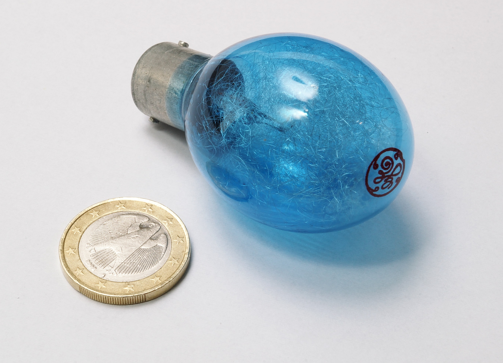 Blitzbirne in Tageslichtausführung für Farbfilme. Stecksockel. Vermutlich Typ PF4.